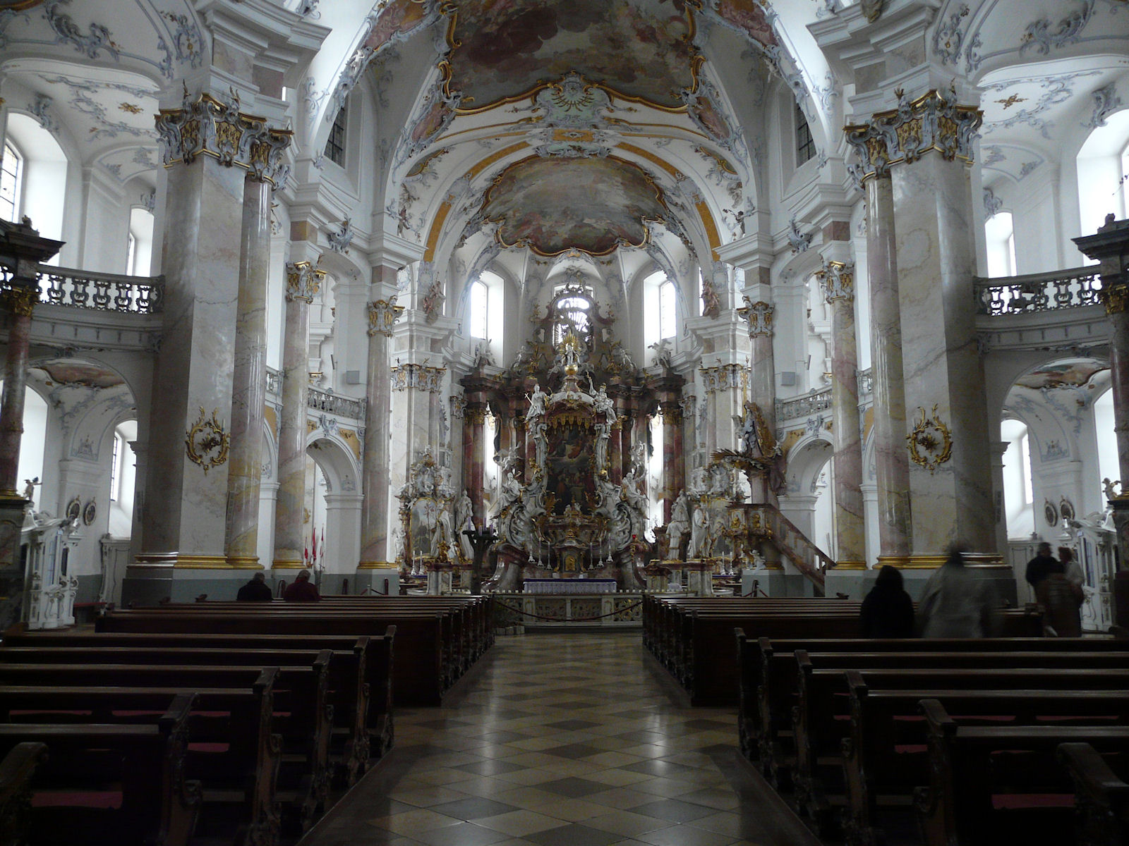 Die Basilika Vierzehnheiligen bei Bad Staffelstein im Landkreis Lichtenfels ist eine Wallfahrtskirchen in Oberfranken. Basilica of the Fourteen Holy Helpers, Bad Staffelstein near Bamberg, in Bavaria, Germany